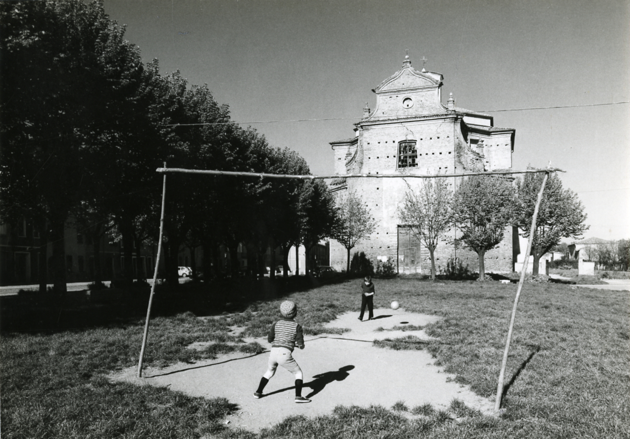 Servizio fotografico : Gualtieri, 1977 / Paolo Monti. - Stampe: 2 : Positivo b/n, gelatina bromuro d'argento/ carta, 24x30. - ((Al verso delle stampe manoscritti i numeri dei negativi corrispondenti: 2909/8, 2909/10. Sul coperchio della scatola, manoscritto a pennarello: "Emilia/ Modena - Parma - Piacenza - Reggio E.". - Occasione: Documentazione per la pubblicazione (Silvana editoriale, 1977). - Fonte: Fattura di Paolo Monti: IV. Commesse/ Fattura n. 9/ Fotografie monumenti artistici Emilia-Romagna (1976/07/05), presso Archivio Paolo Monti. - Fonte: Monografia di Gambi, Lucio et al.: Strutture rurali e vita contadina, Milano-Bologna, Silvana editoriale d'arte-Federazione delle Casse di Risparmio dell'Emilia Romagna (1977). - Fonte: Fattura di Paolo Monti: IV. Commesse/ Fattura n. 13/ Fotografie per volume Civiltà contadina Emilia Romagna (1977/07/01), presso Archivio Paolo Monti